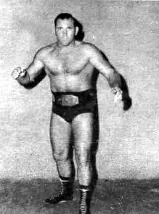 Dory Funk Jr. en une du volume 1 du n.1 du journal de catch Wrestling News du 15 juin 1972. Cowboy Bill Watts, Parente & Hart et Danny Little Bear sont sur l'image mais pas utilisables.